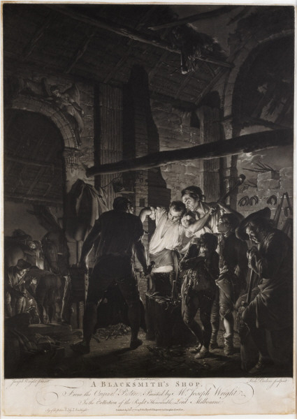 A Blacksmith's Shop. Mezzotint, 23 3/4 x 17 in. (60.4 x 43.2 cm), state iii/iii.